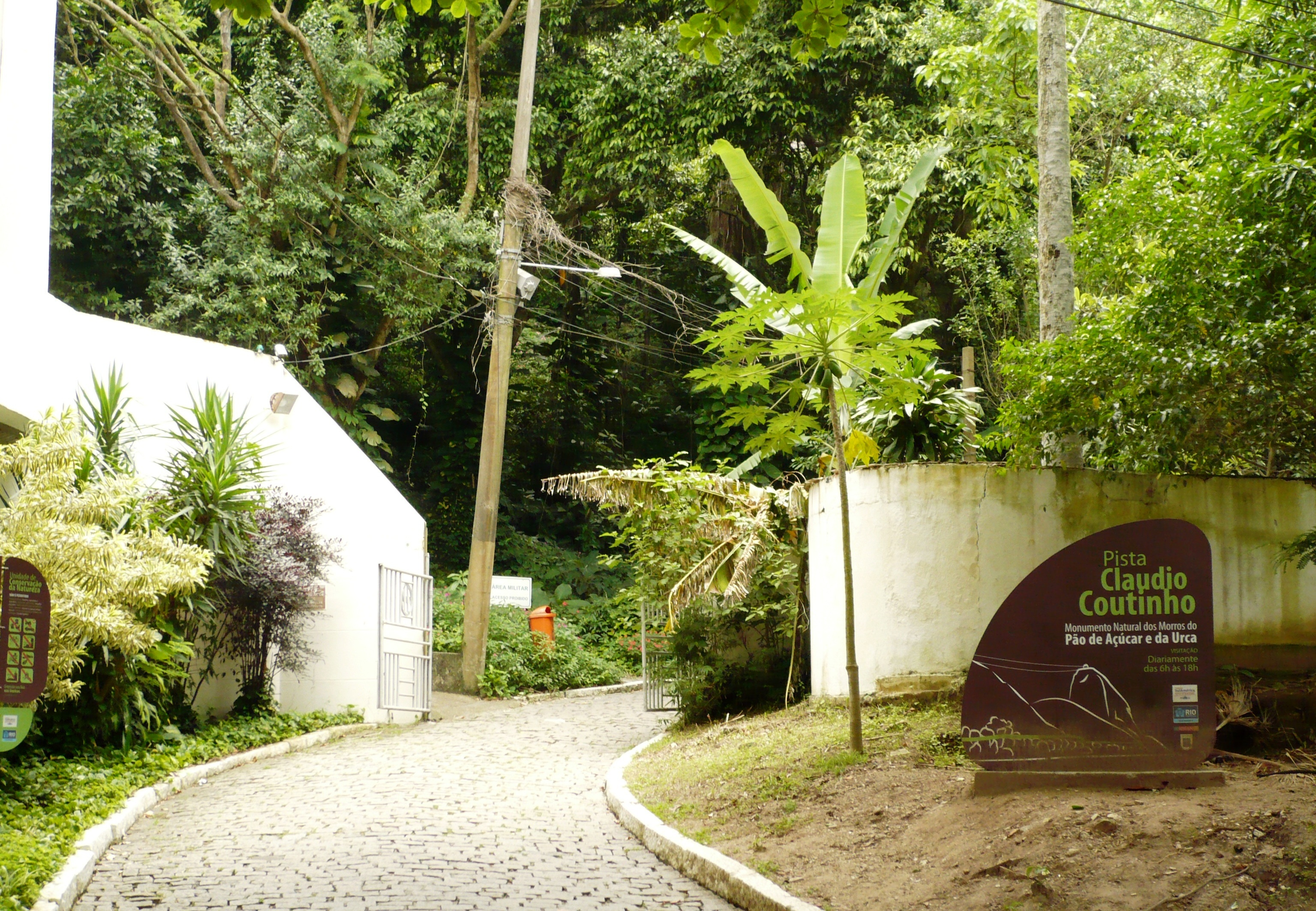 Pista Cláudio Coutinho, bairro da Urca, Rio de Janeiro, RJ, Brasil: acesso.